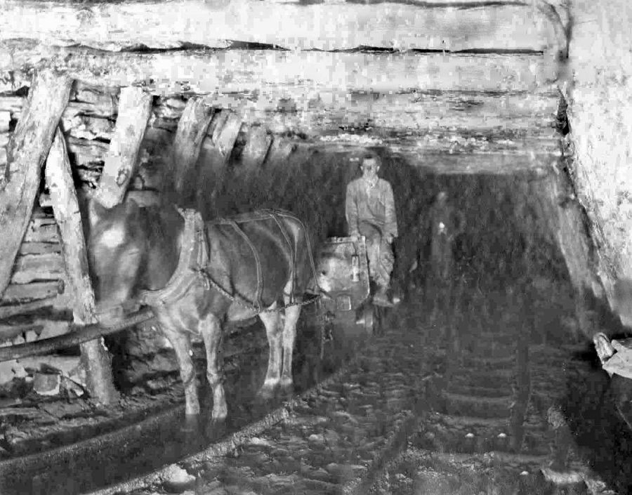 Юзовка. Коногон в шахте